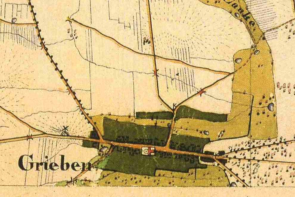 Karte von Grieben, Kreis Ruppin, Provinz Brandenburg, 1825